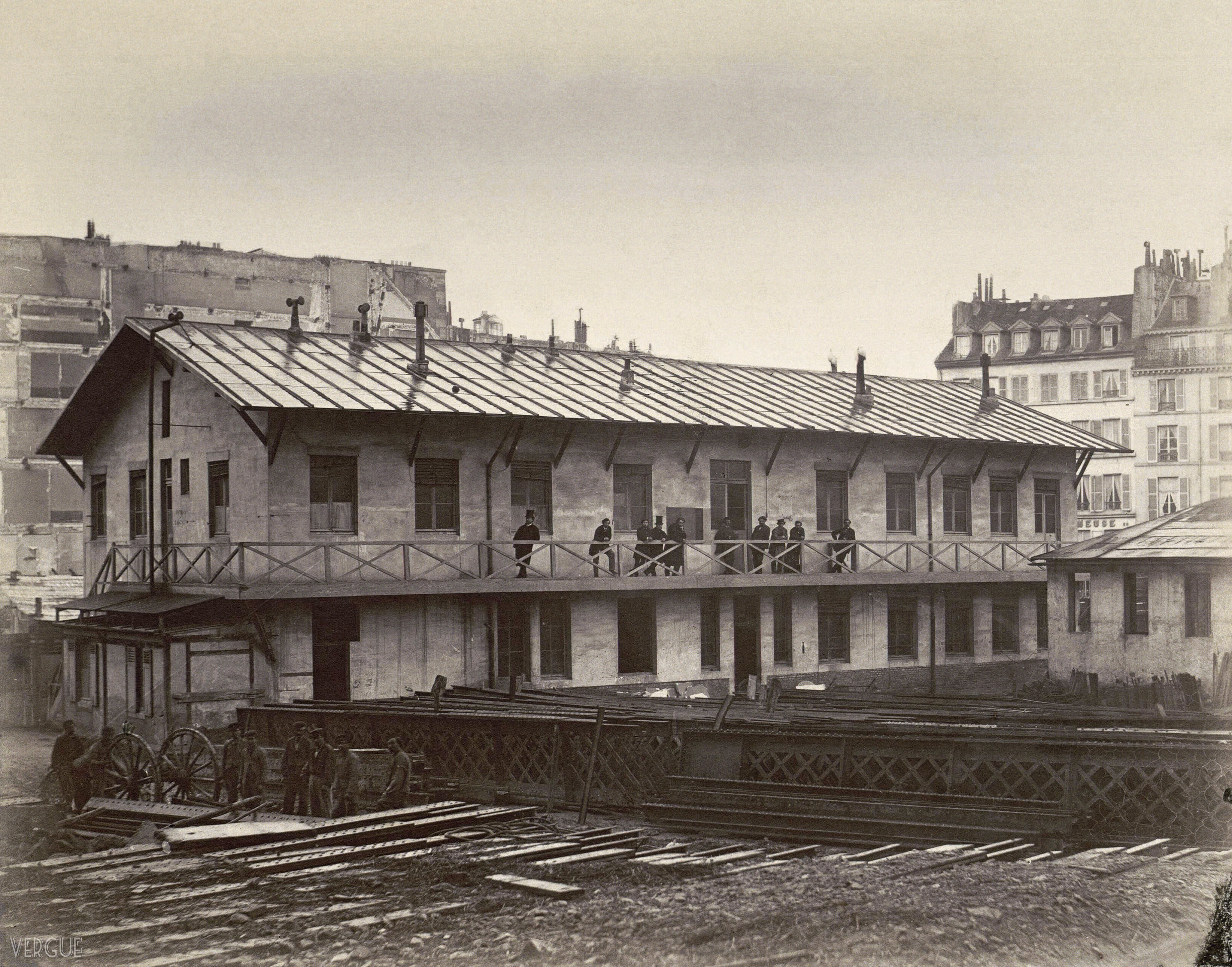 Locaux de l’agence Garnier sur le chantier de construction de l’Opéra de Paris, rue Neuve des Mathurins.